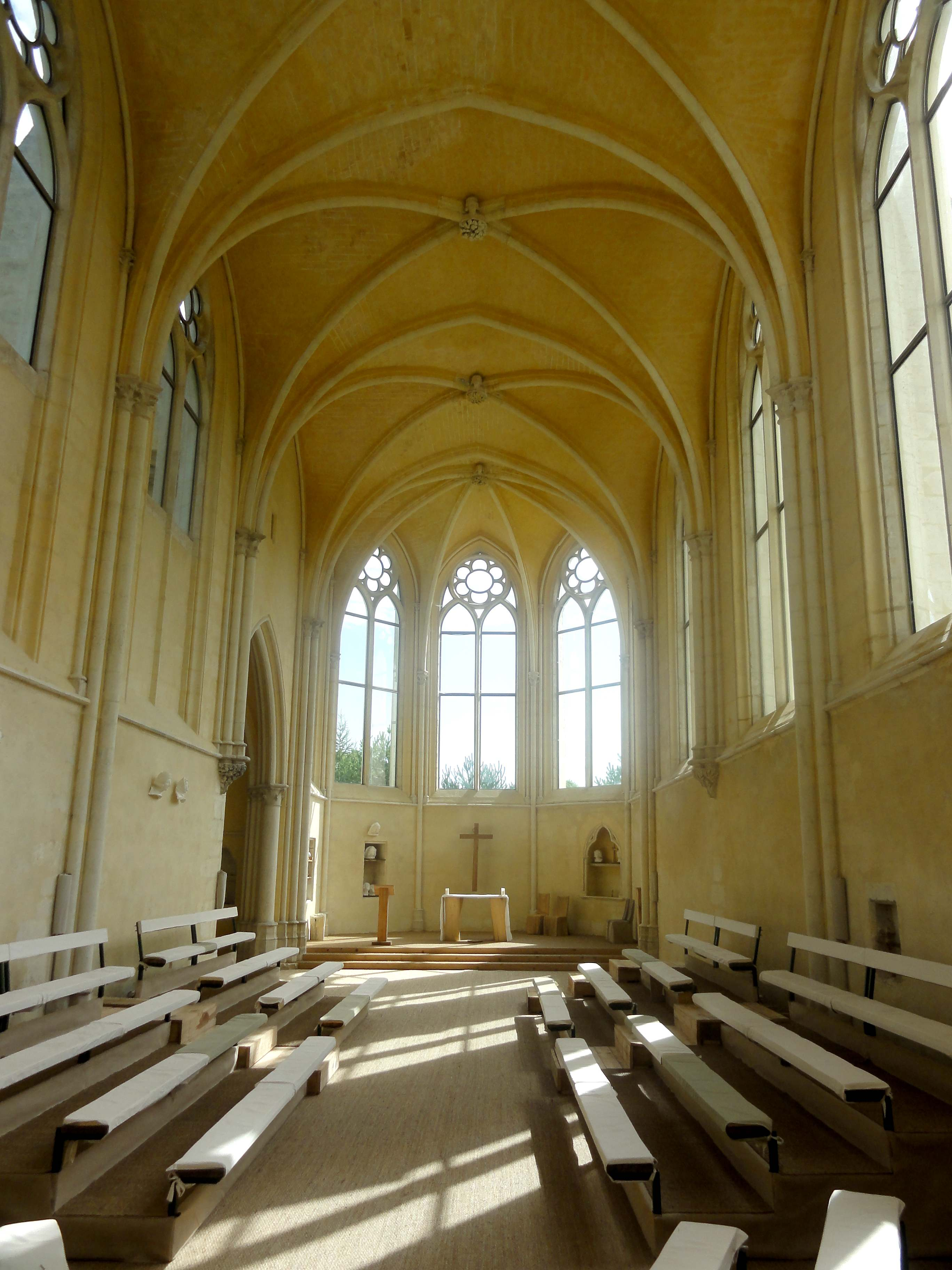 Intérieur de la chapelle, vue vers l'est.